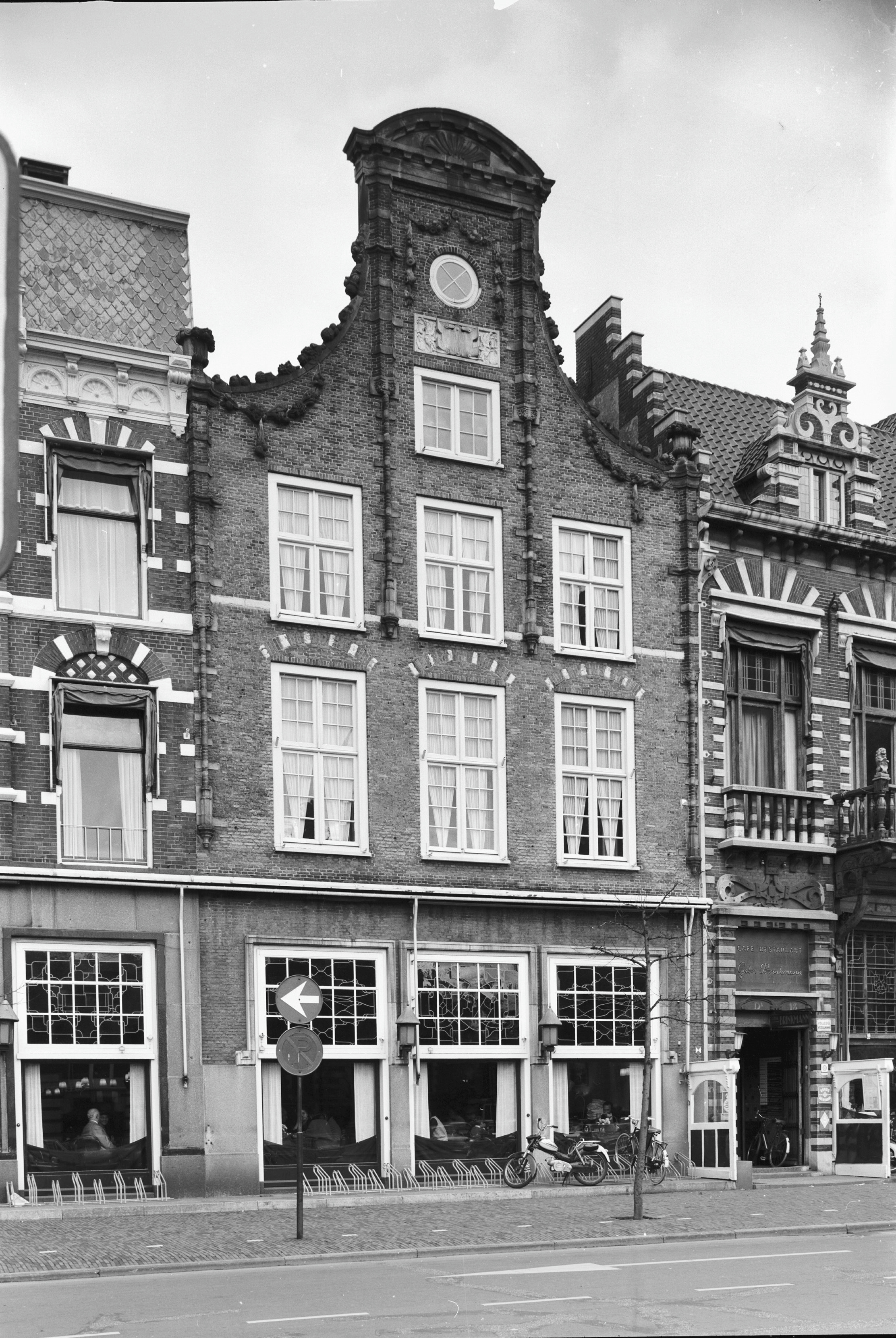 Sterfhuis Bilderdijk met herdenkingsteen uit 1885 in de voorgevel